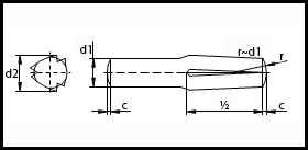 ISO 8741